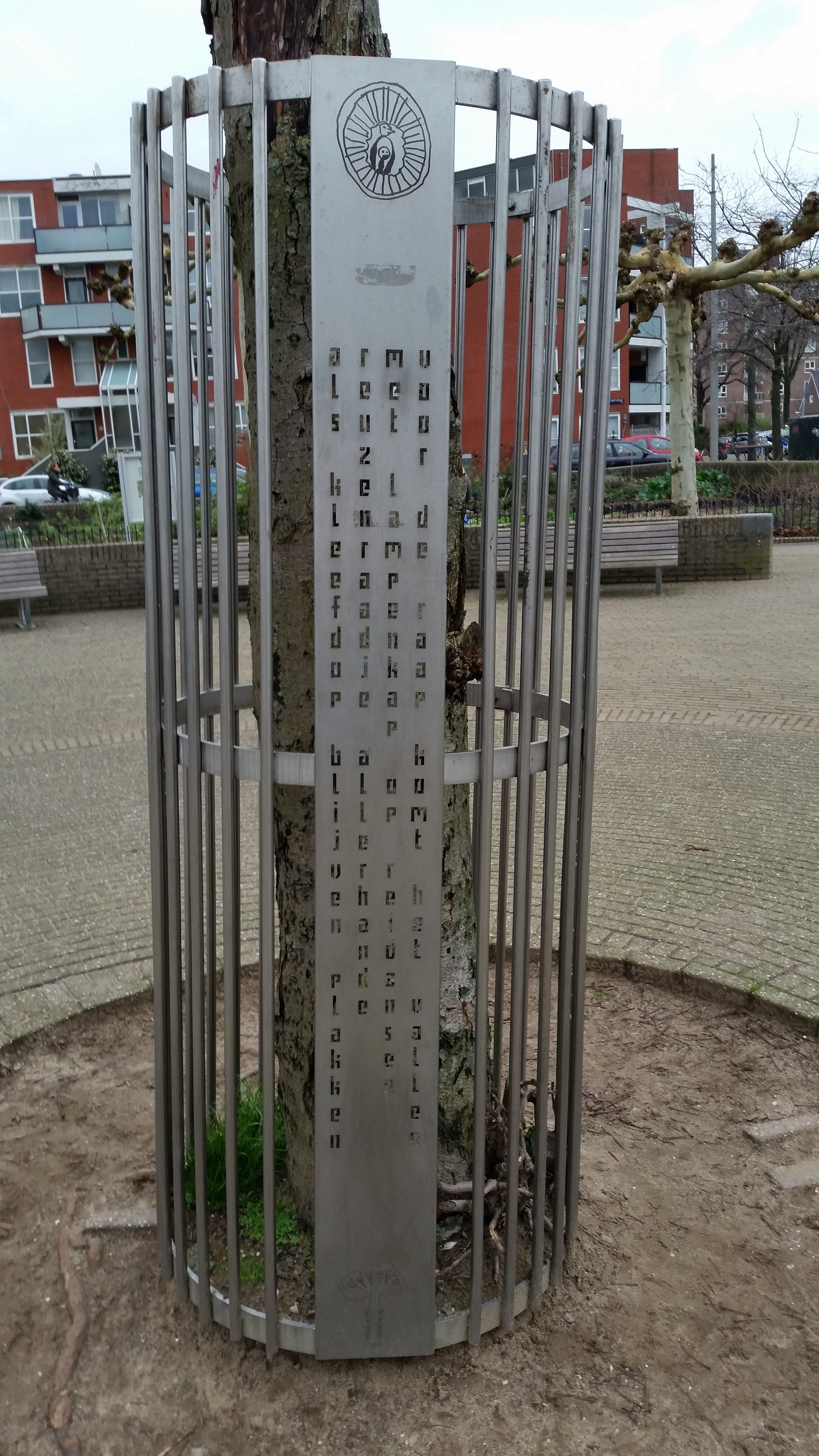 Nicolaas Beetsplantsoen, Amsterdam, Ontwerp Lilian van Veen; de teksten Christian Maat/Kristiaan Kanstadt